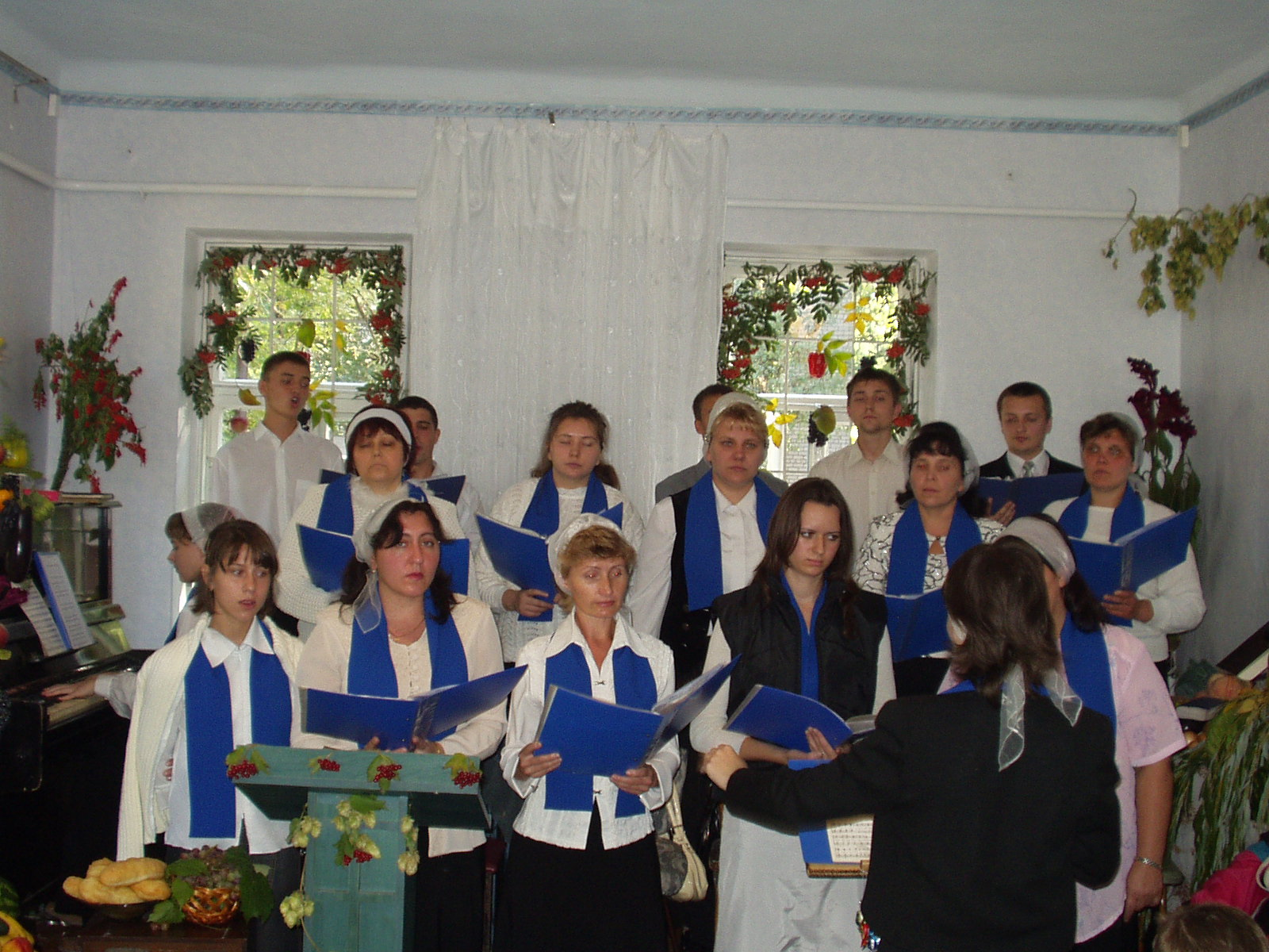 romantik.church